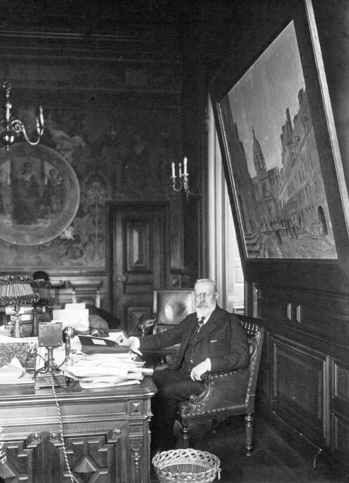 M. Paul Appell, recteur de l'Académie de Paris, à son bureau : photographie de presse